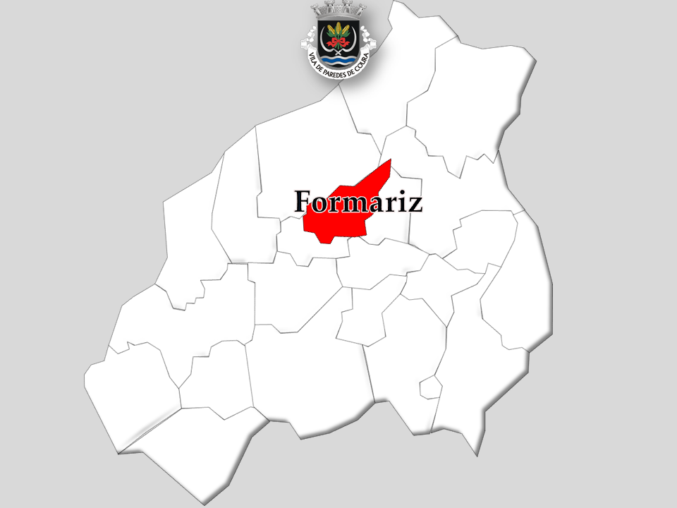 Censos 1864/2011